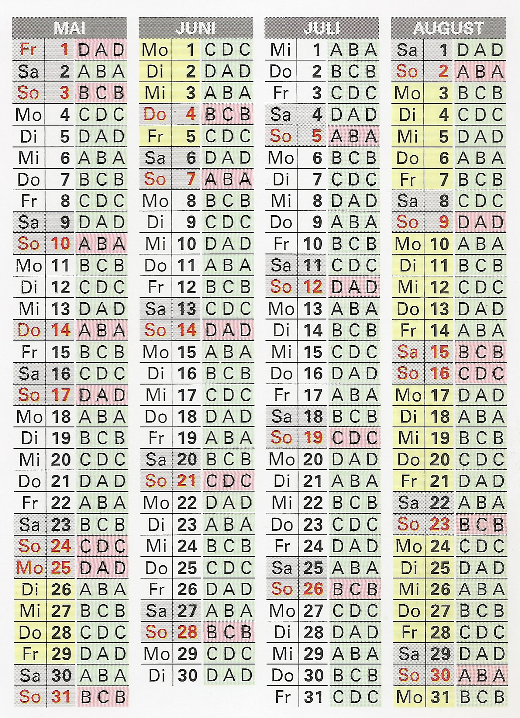 Polizei-Schichtdienst-Kalender/Schichtdienstplan, 4-Schicht-Betrieb, Mai bis August 2015, Buchstaben bezeichnen die Dienstgruppen